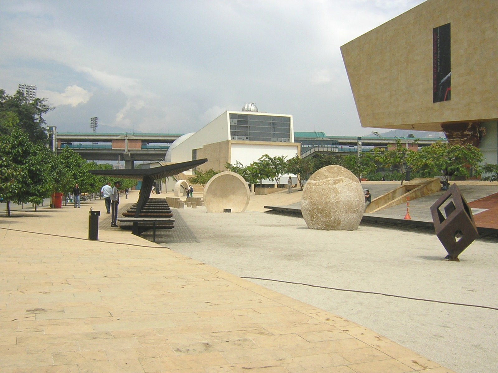 Parque de los Deseos. Medellín, Colombia.